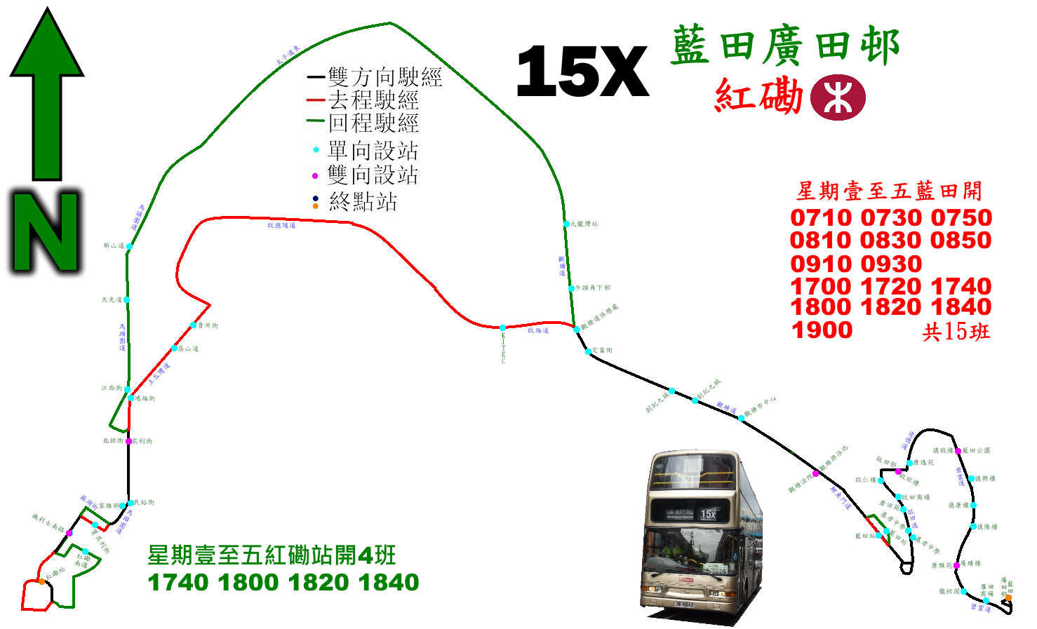 中文（香港）: 九巴15X線的走線圖